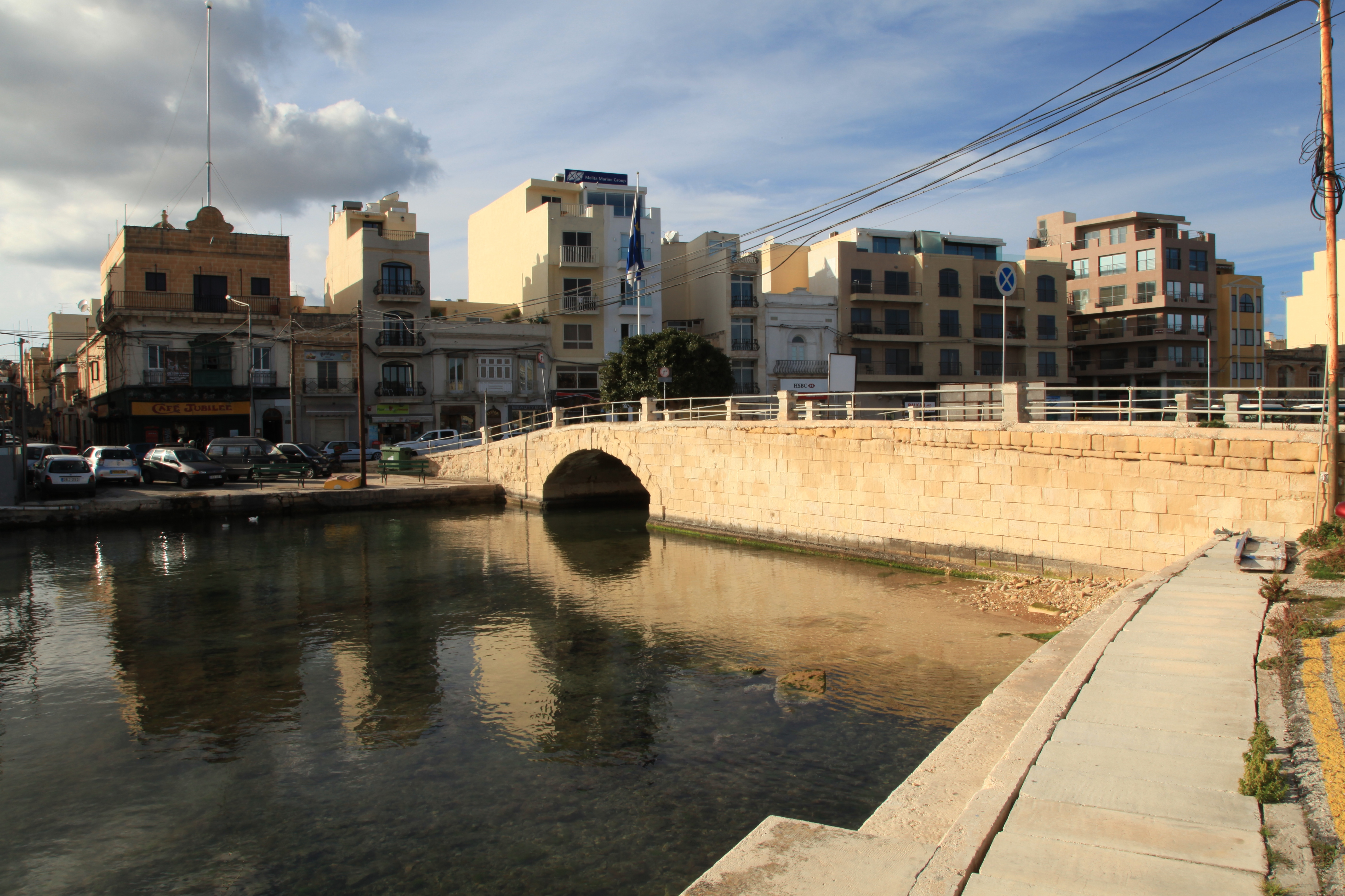 Manoel Island Bridge and Triq Ix-Xatt ("The Strand") in Gżira, Malta